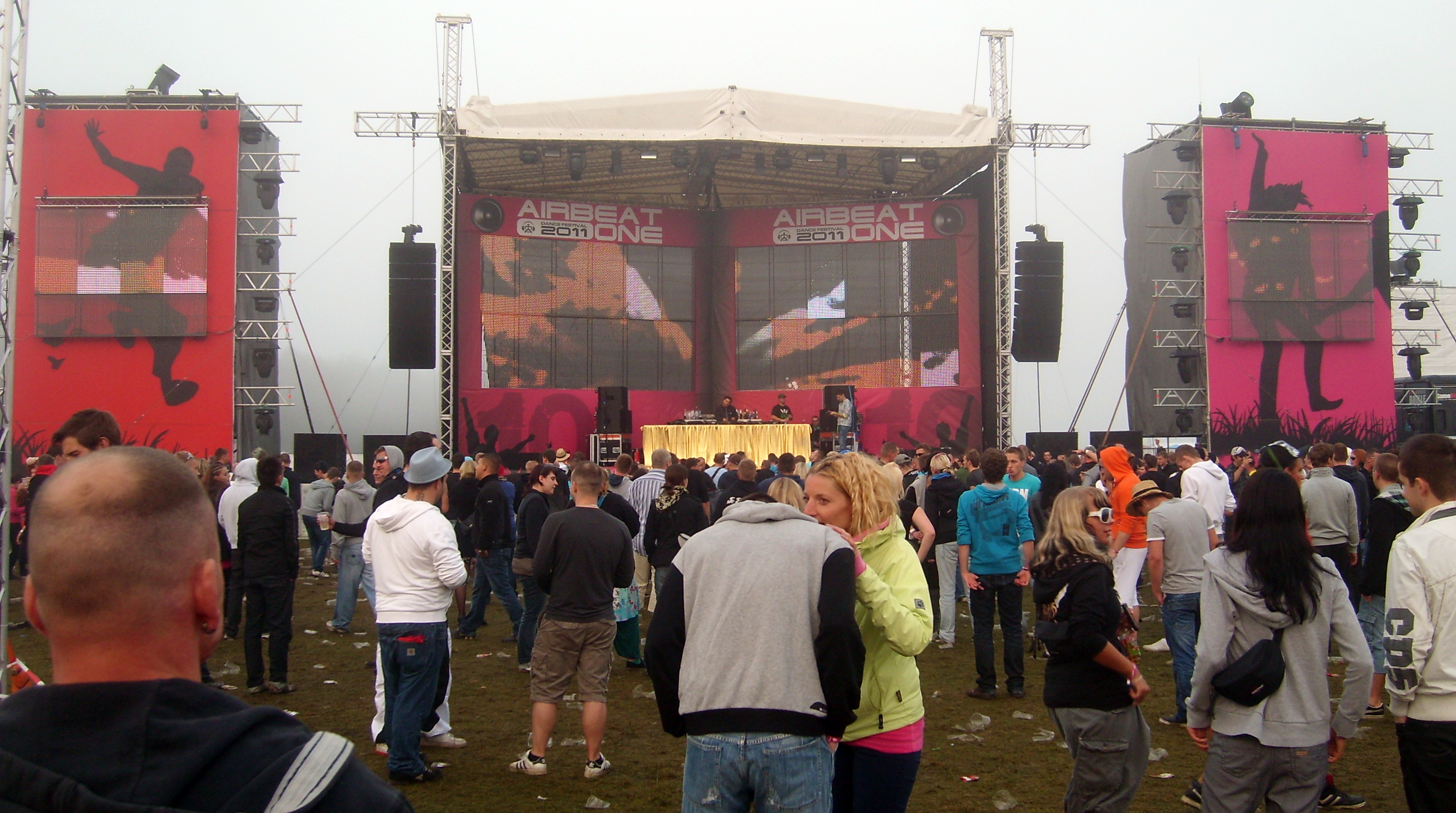 Airbeat One Festival 2011